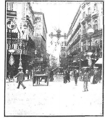 Madrid engalanado, las iluminaciones. La calle del Arenal. La calle del Caballero de Gracia. La calle de la Montera. Fots. Campúa